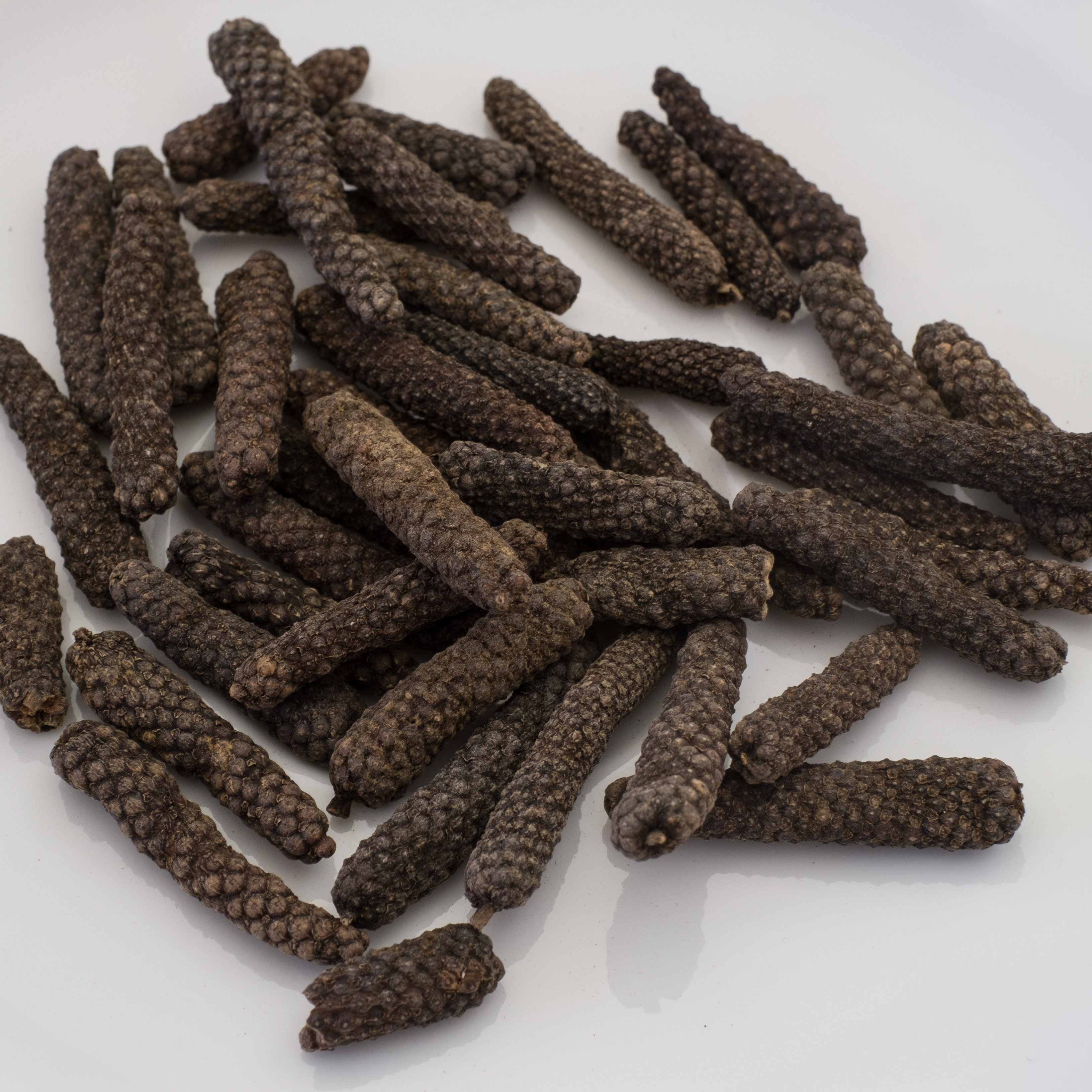 Langer Pfeffer, Langpfeffer, Bengalischer Pfeffer, piper longum